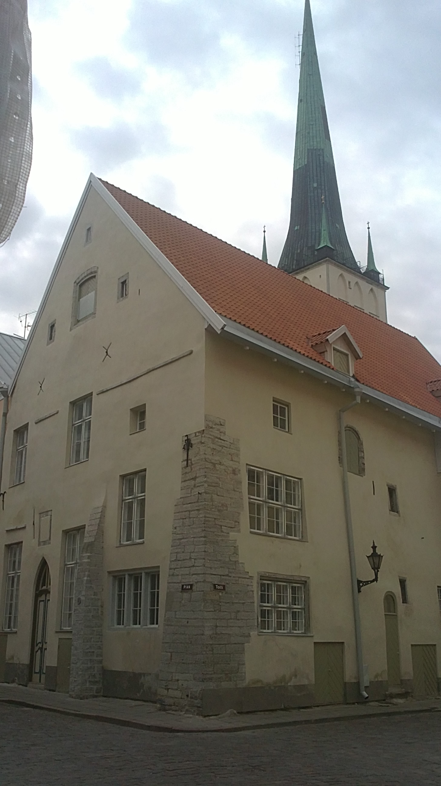 Hoone, Tallinna vanalinnas, Pika tänava ja Tolli tänava nurgamaja